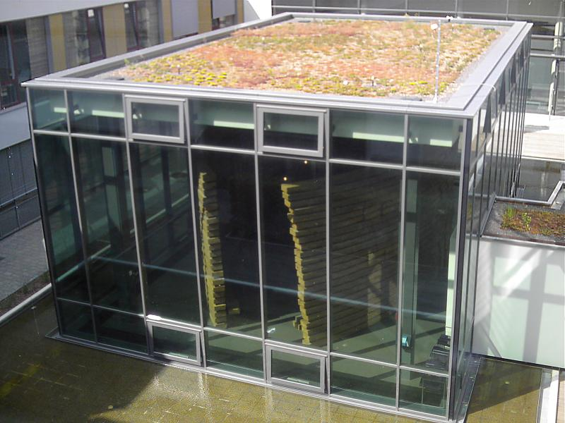 Außenansicht Kapelle